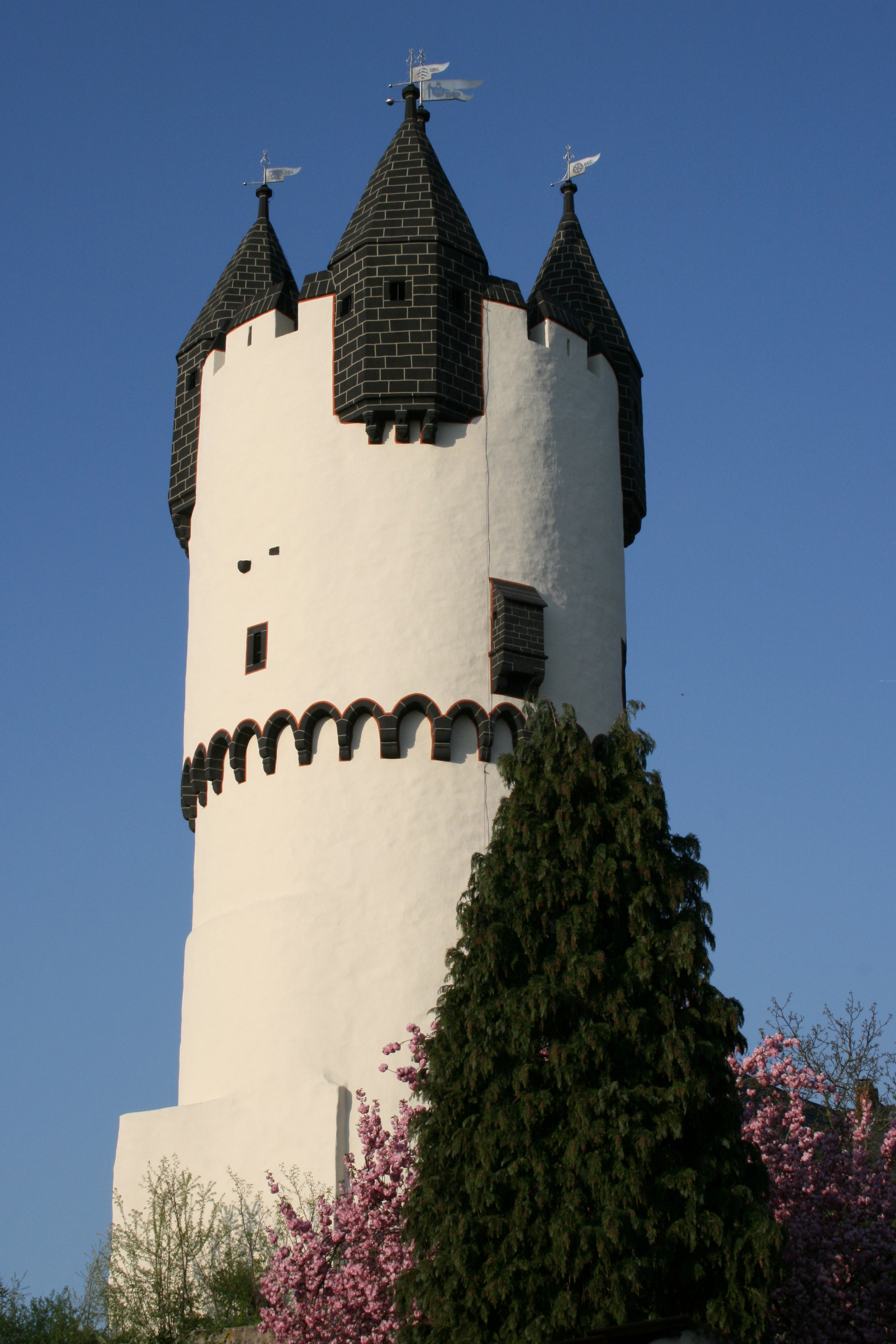 Schloss Steinheim in Hanau-Steinheim. Ansicht des Bergfrieds